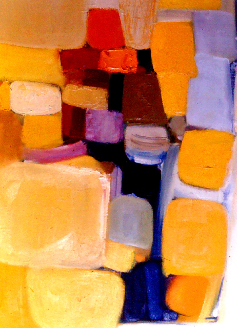 Artisam